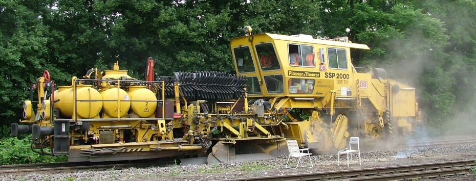 Ein Schotterpflug im Einsatz